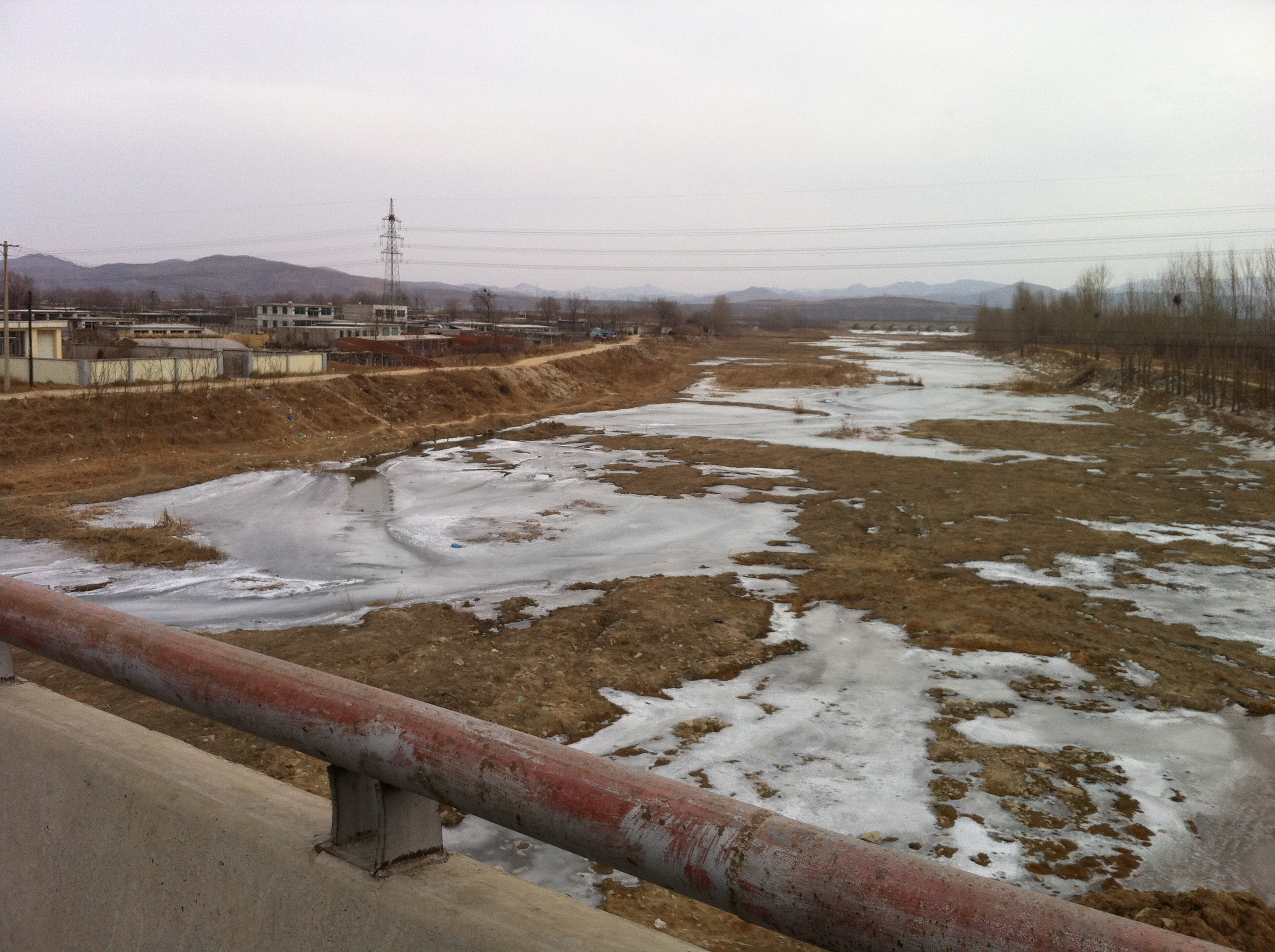 Bayuquan, Yingkou, Liaoning, China